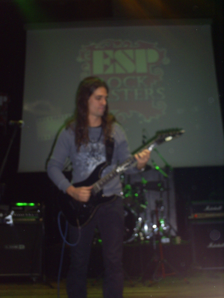 Kiko Loureiro, lanzamiento de guitarra ESP en Santiago de Chile